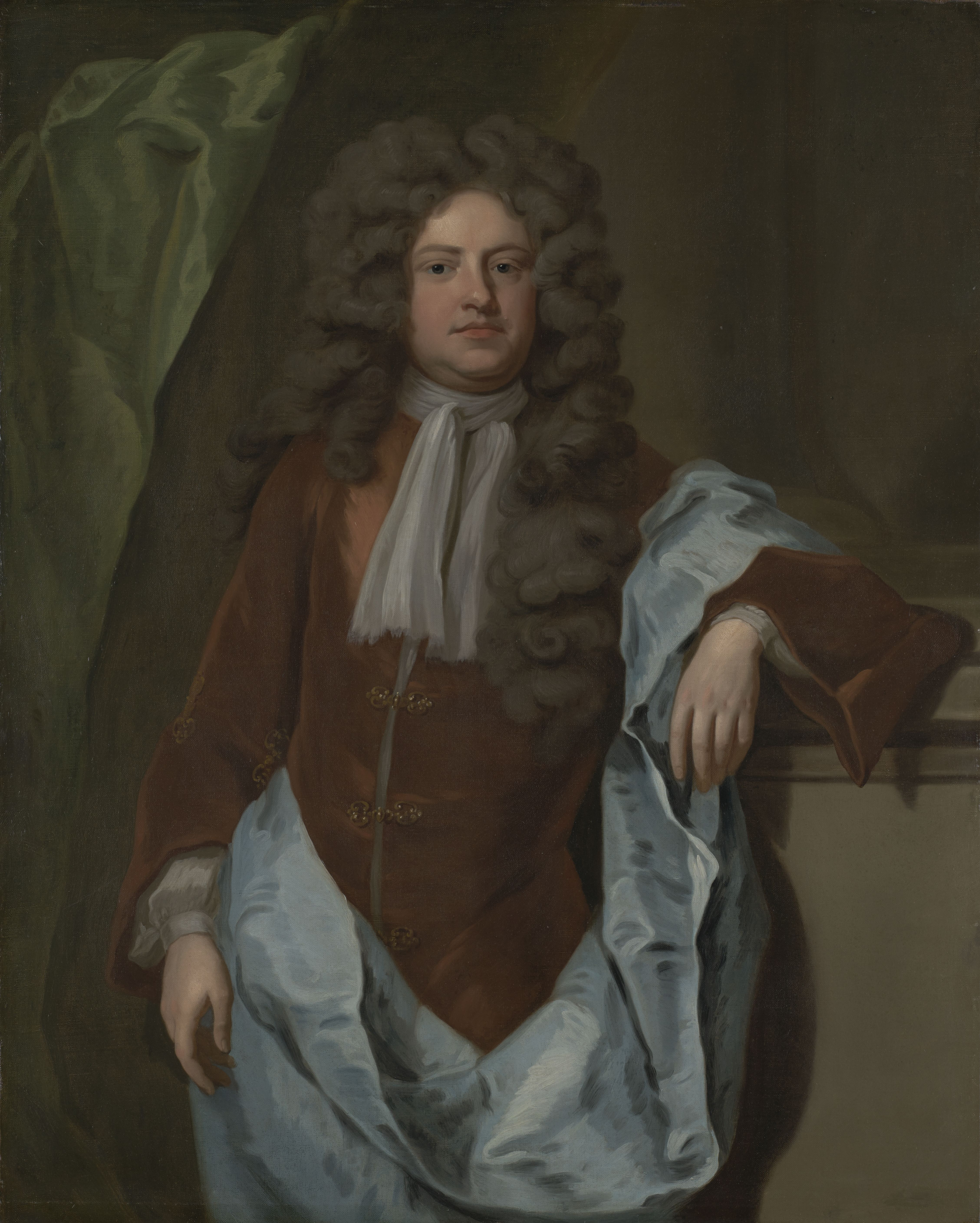 here